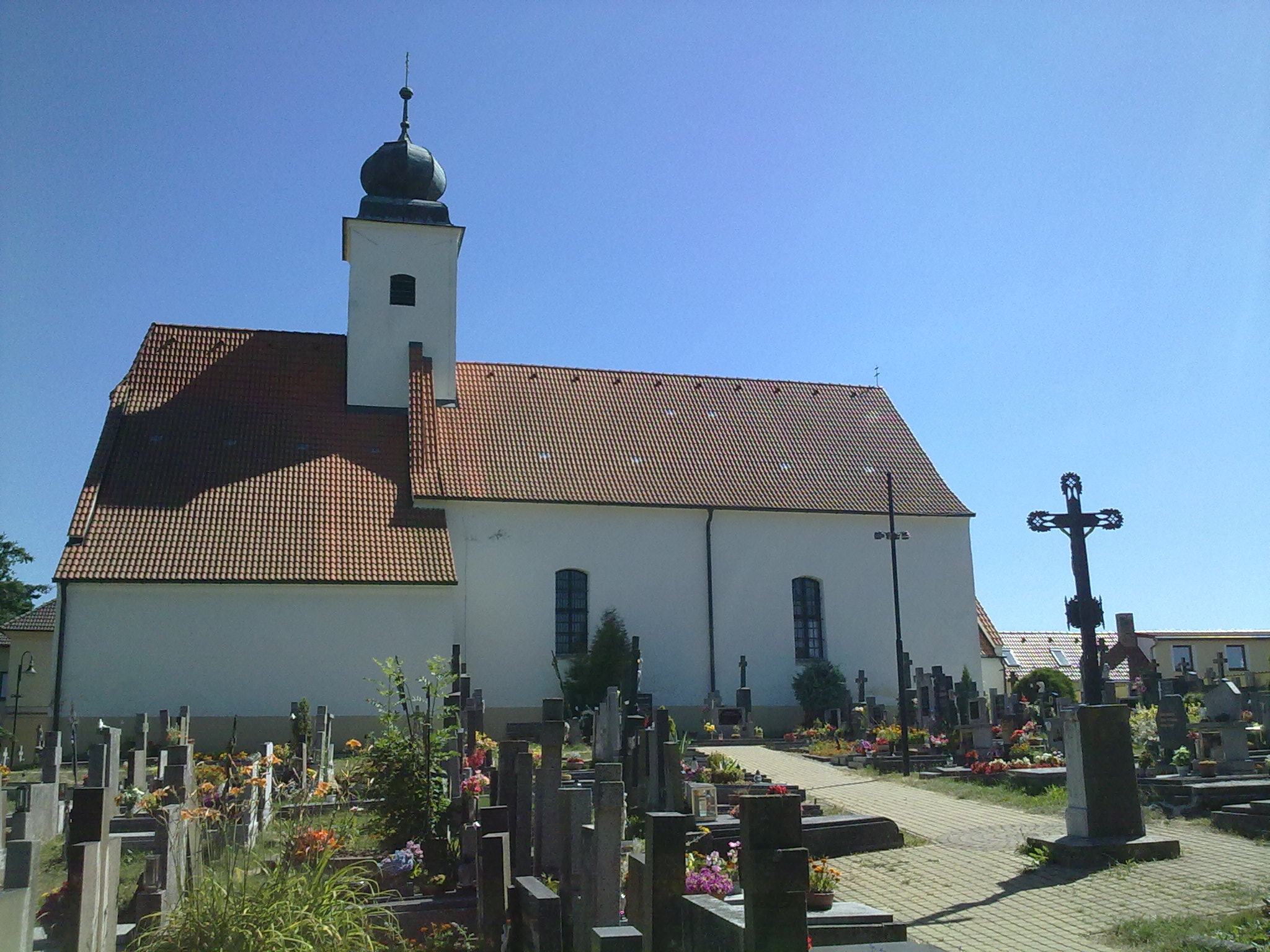 Farní gotický kostel Nanebevzetí Panny Marie ve Štěpánovicích, vystavěný roku 1356, obklopený hřbitovem